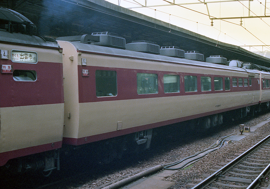 国鉄 キサシ180形 キサシ180-10